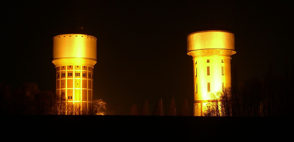 Wassertürme am Hellweg bei Hamm